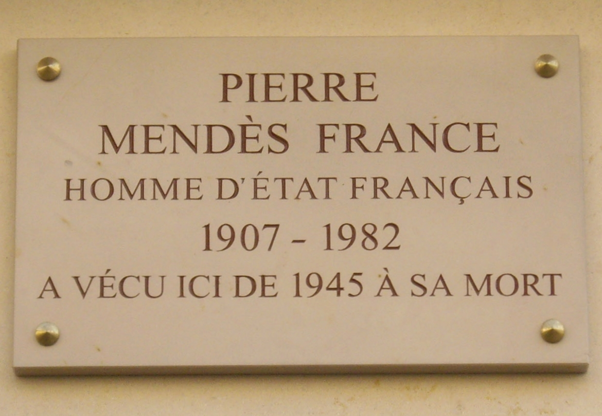 Plaque commémorative, 23 rue du Conseiller-Collignon, Paris 16e. « Pierre Mendès France, homme d'État français, 1907-1982, a vécu ici de 1945 à sa mort. »